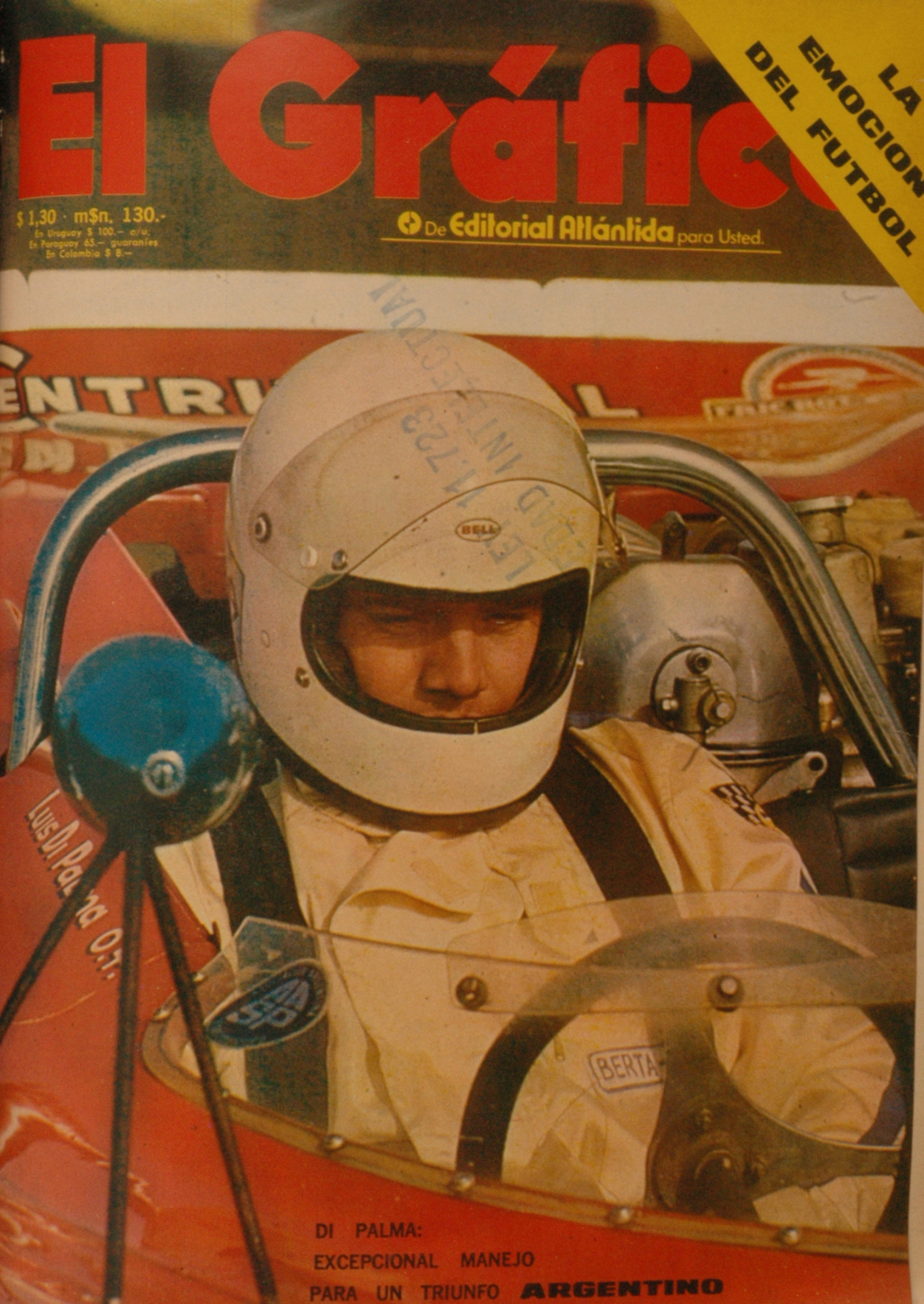 El Grafico del 29 de Junio de 1971. Edicion 2699